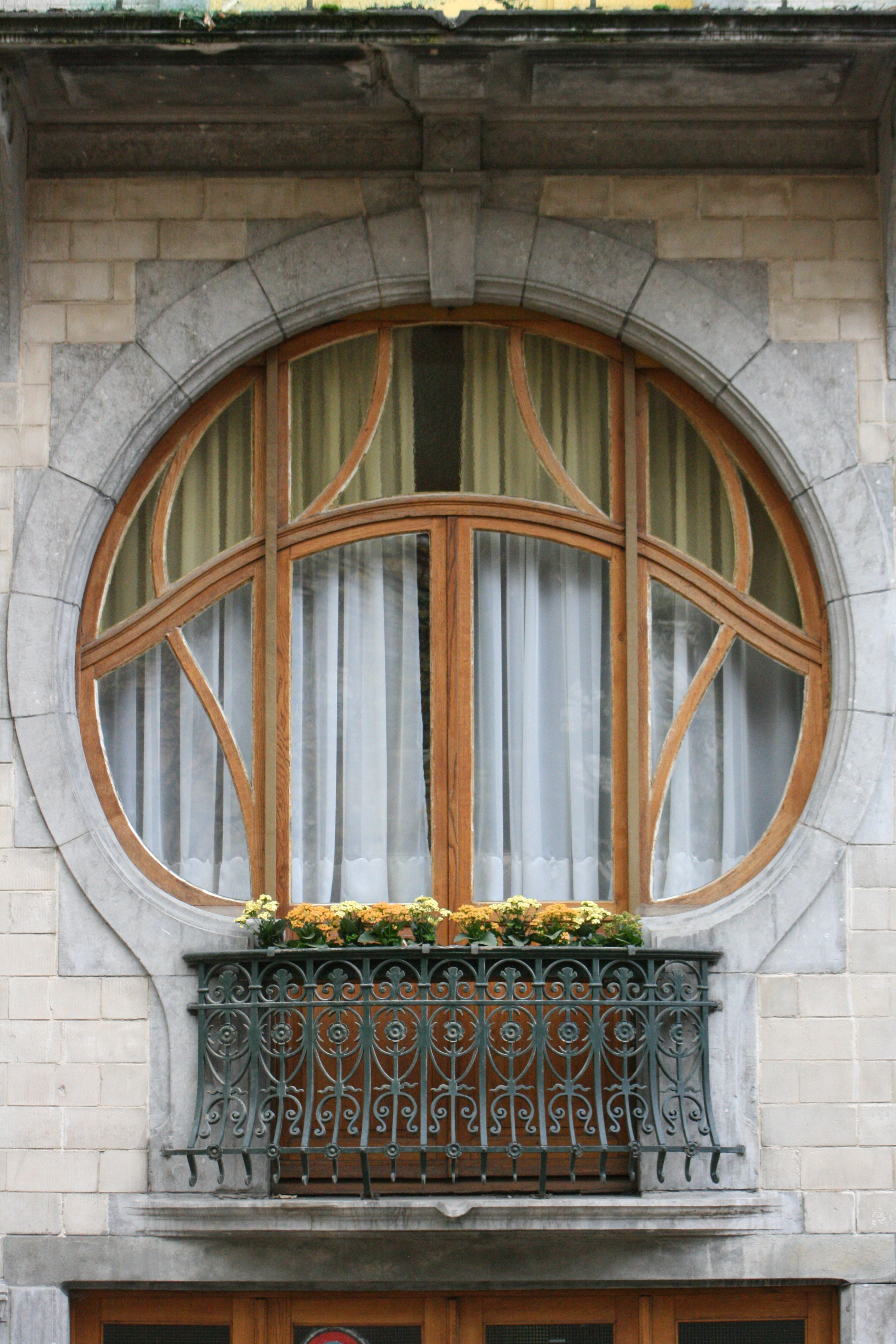 Place Victor Carbonnelle 5, Tournai, Belgique. Immeuble Art Nouveau (1903). Architecte De Porre. Baie circulaire